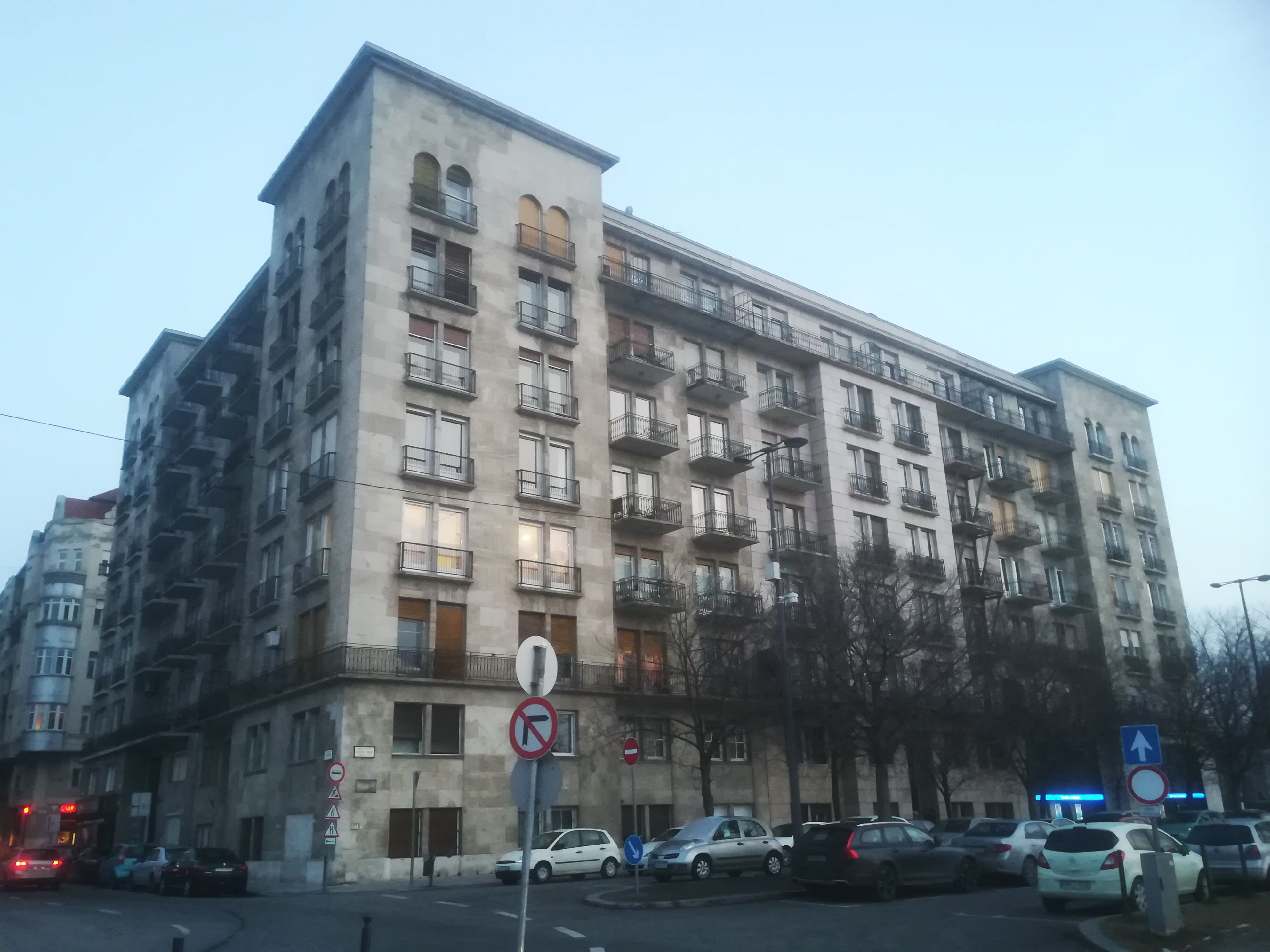 Markó utca 1/A alatti épület, Budapest V., tervezte Breuer Imre, építés éve 1937–1938